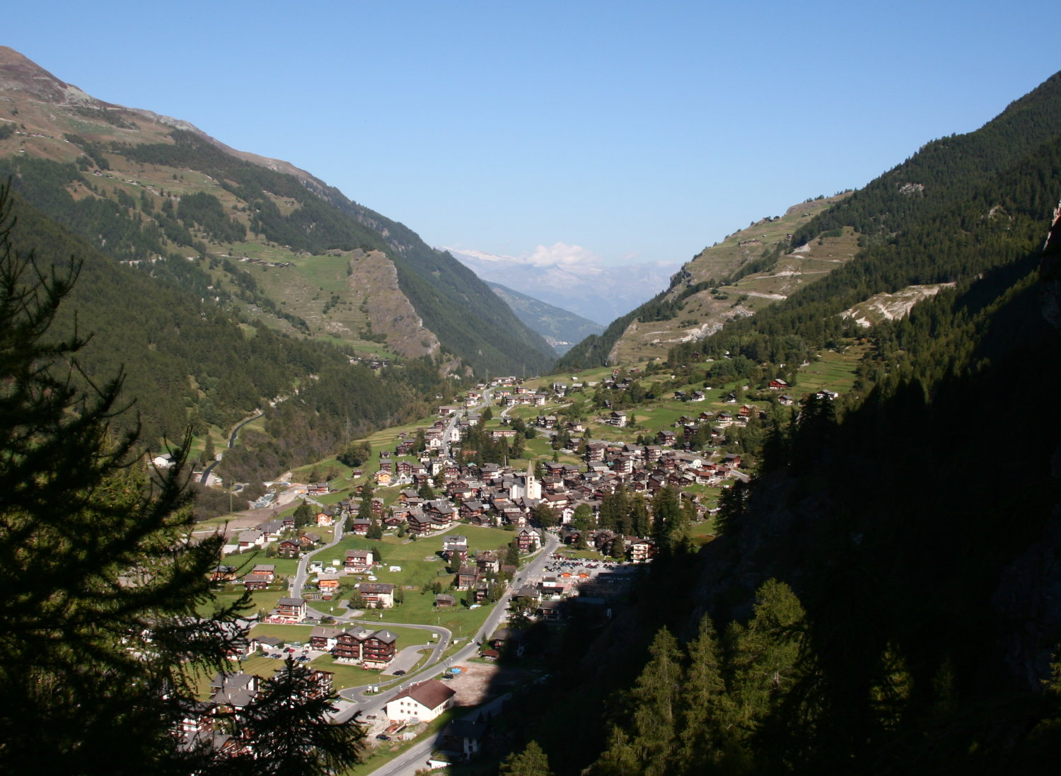 Village d'Evolène, Val d'Hérens, Vallais, Suisse